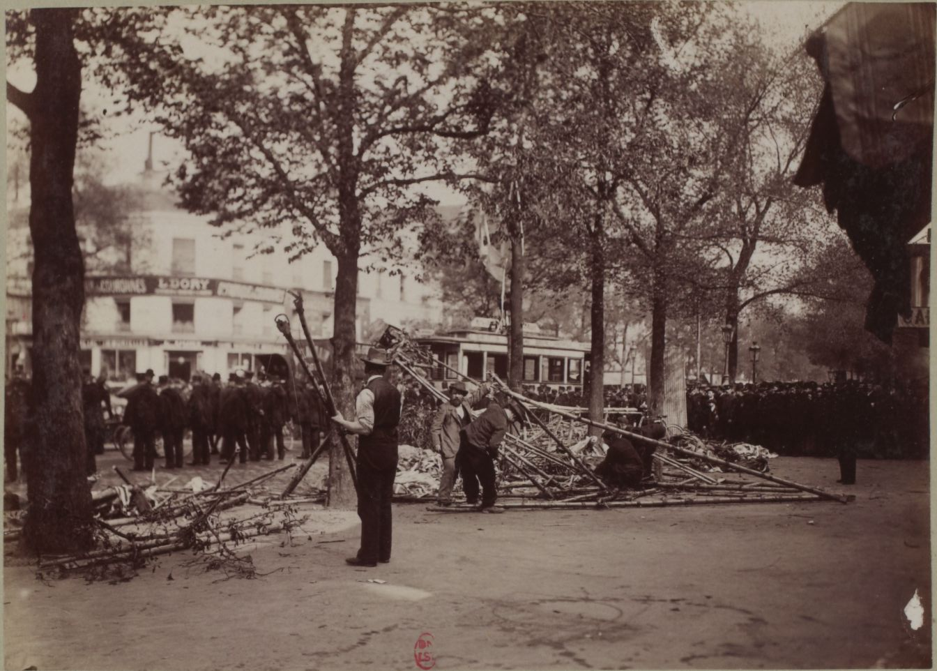 Les débris du ballon dirigeable Pax tombé avenue du Maine.